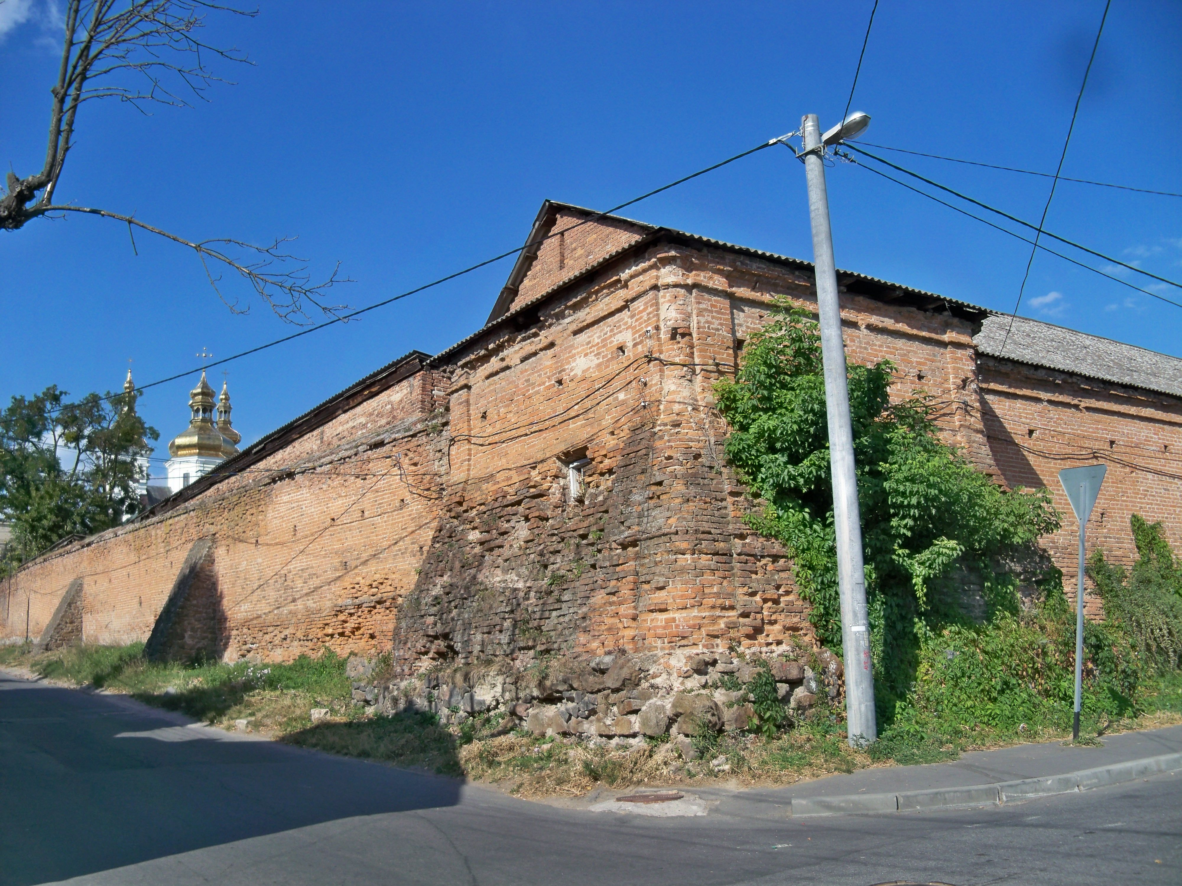 Домініканський монастир - Башта та мур., Вінниця, вул. П.Осипенко, 1